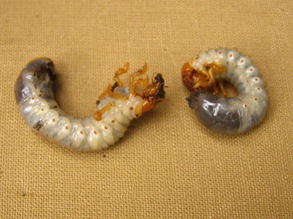 Larve des Feldmaikäfers (Melolontha melolontha), gefunden und fotografiert in Potsdam.